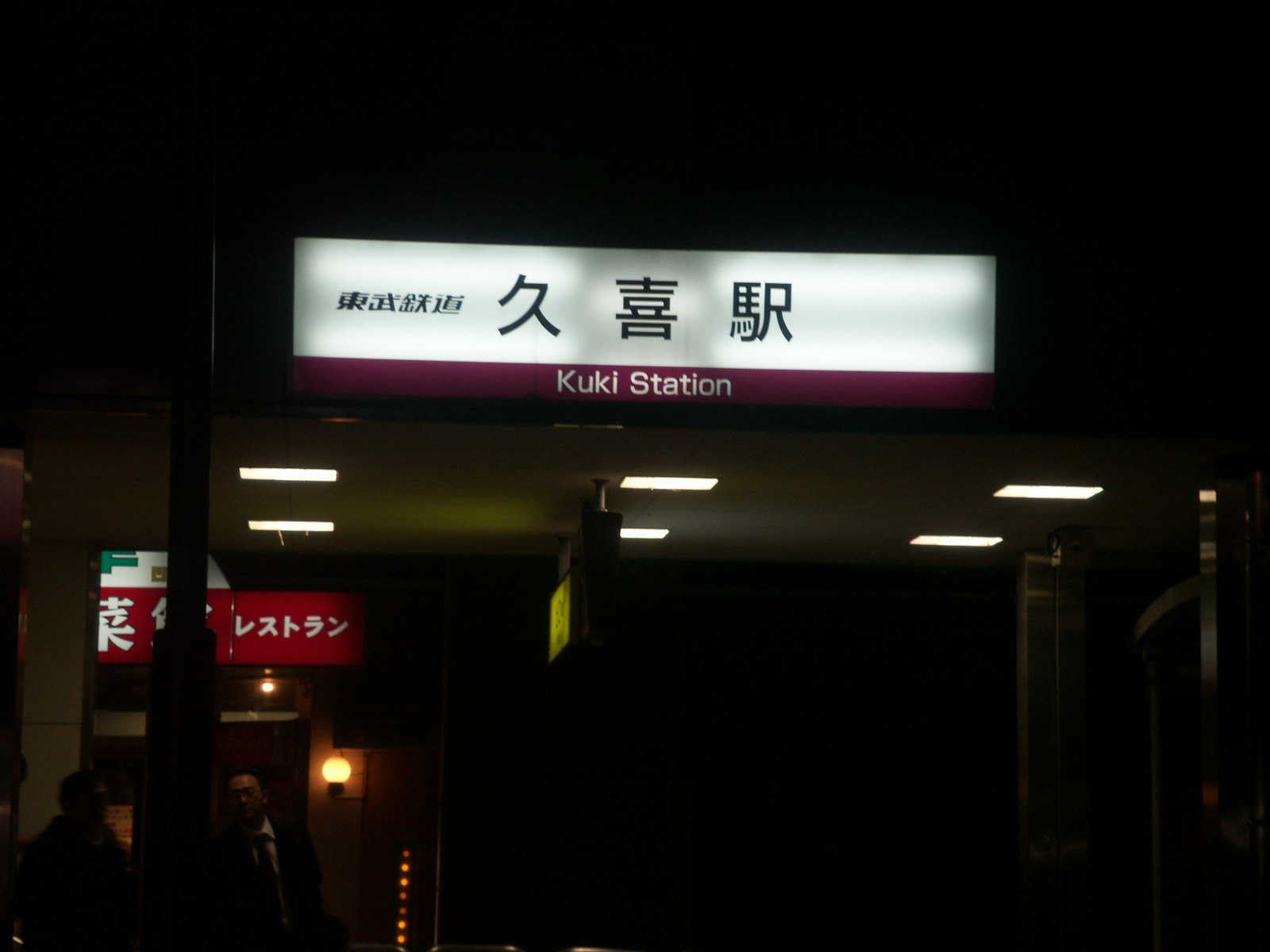 Tobu Kuki Station